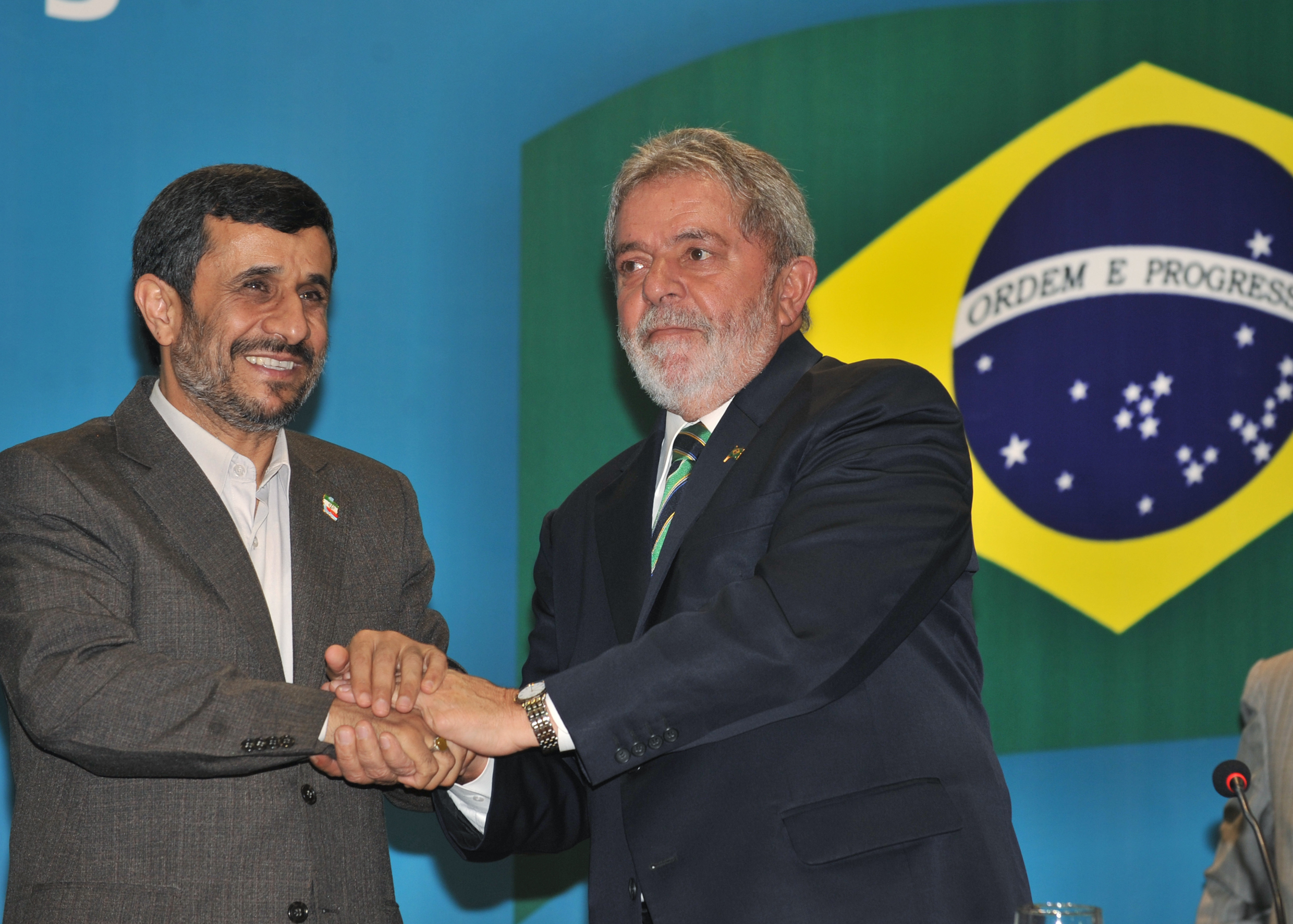 Os presidentes Mahmoud Ahmadinejad e Luiz Inácio Lula da Silva participam do 3º Encontro Empresarial Brasil-Irã